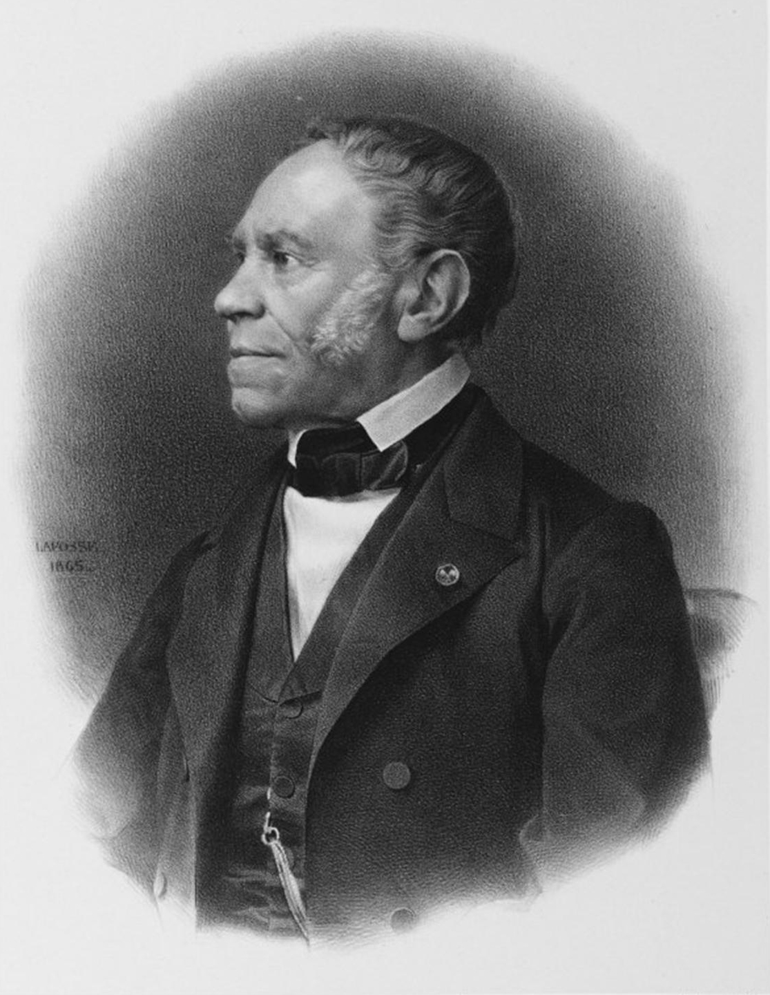 French chemist Anselme Payen (1795-1871)